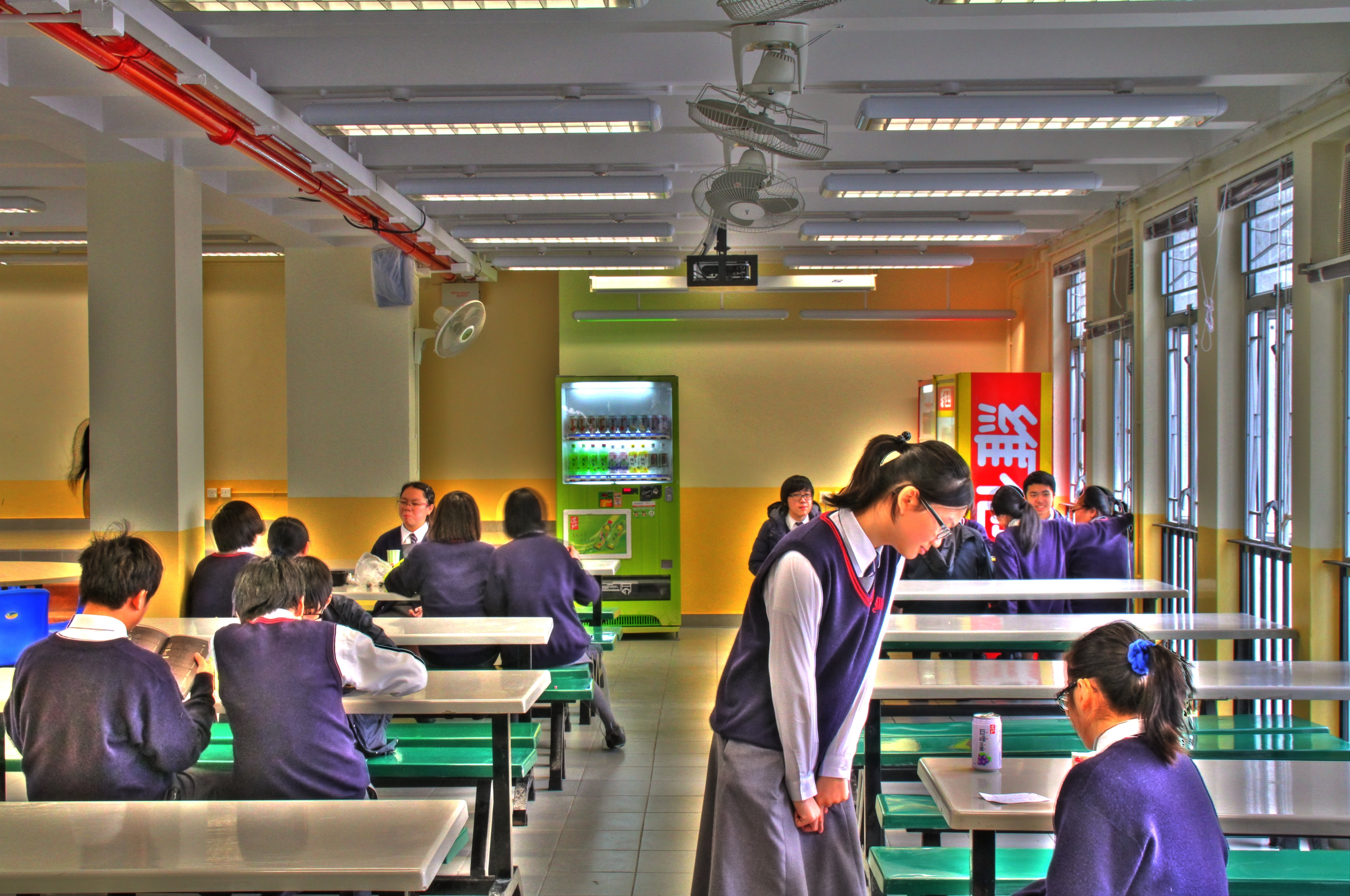 香港zh:循道中學